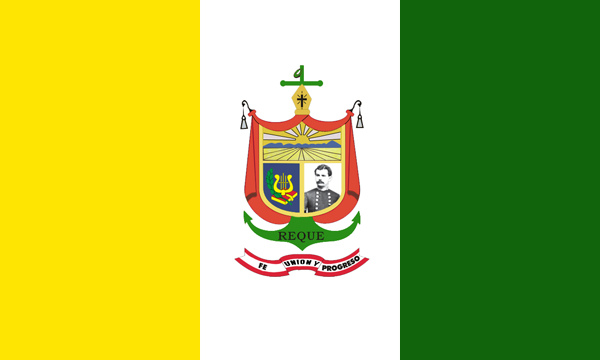 Bandera del Distrito de Reque